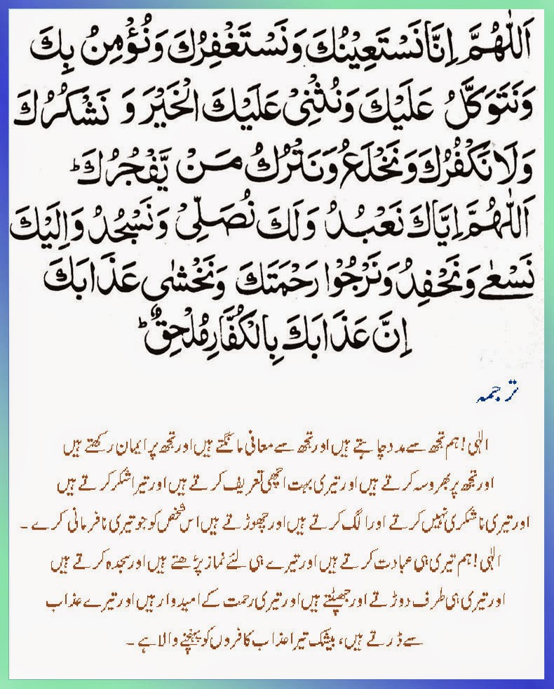 A Ka Dua prevedena na Arapski jezik